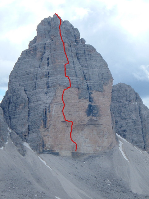 La voie Couzy à la Cima Ovest (ouverte par René Desmaison et Pierre Mazeaud assistés de Pierre Kohlmann et Bernard Lagesse en juillet 1959)